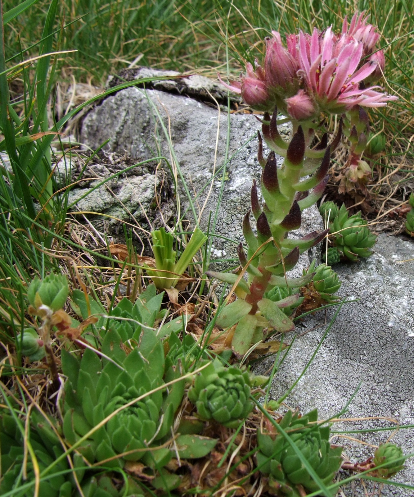 Sempervivum montanum (pl. rojnik górski), habitat: West Tatra Mountains, Trzy Kopy